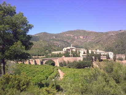 Cartuja de Porta Coeli (Serra, Valencia)